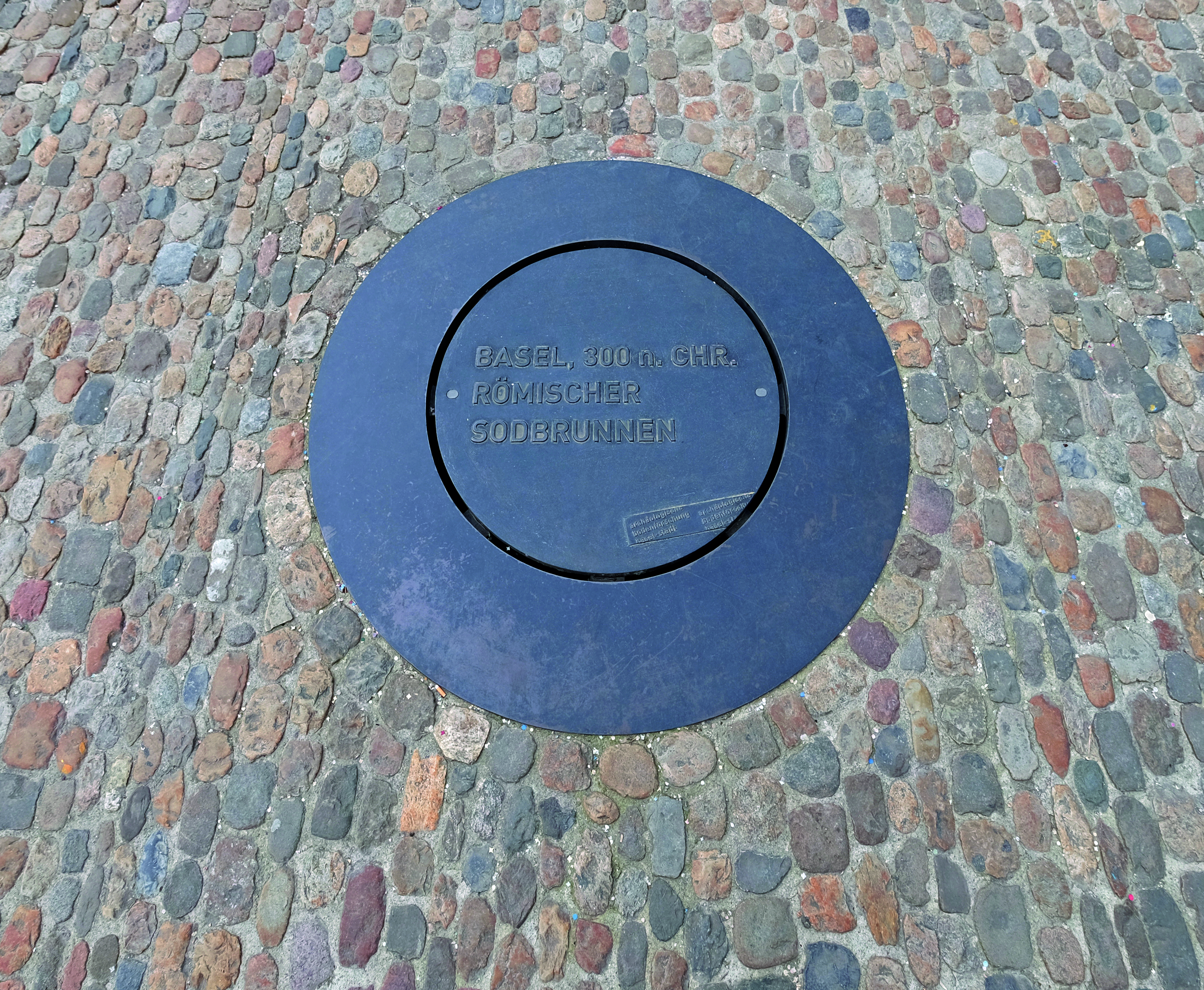 Bereits um 300 n.Chr. gab es auf dem Münsterplatz Basel einen römischen Sodbrunnen. Er führte rund 20 Meter in die Tiefe und versorgte die Anwohner mit Trinkwasser. Foto Christian Lienhard, BwieBasel, Basel